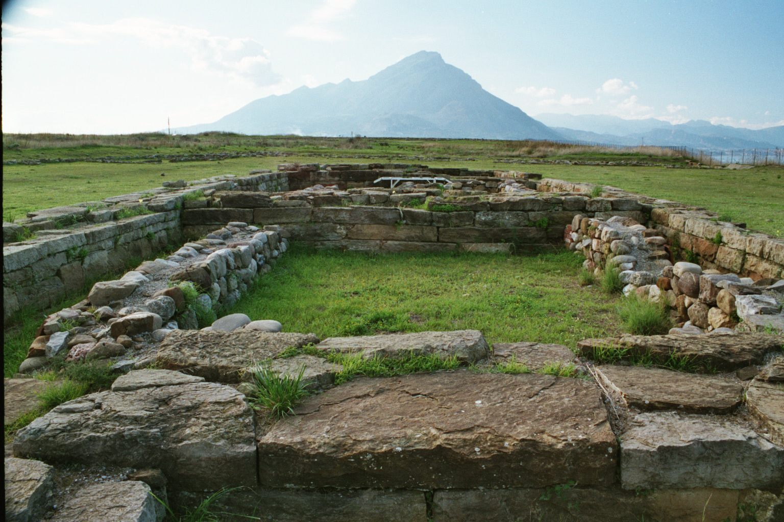 Himera